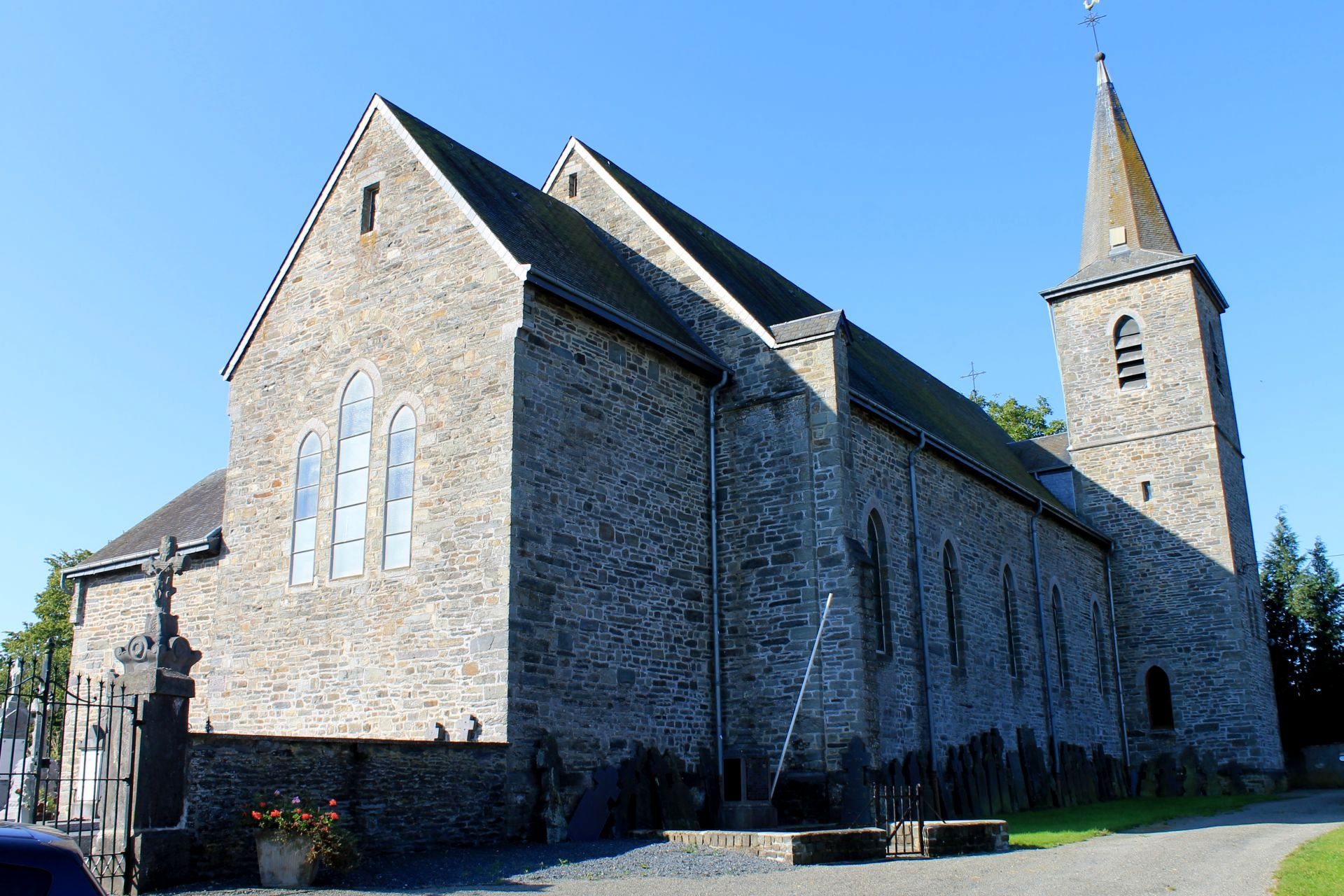 Boeur - Church